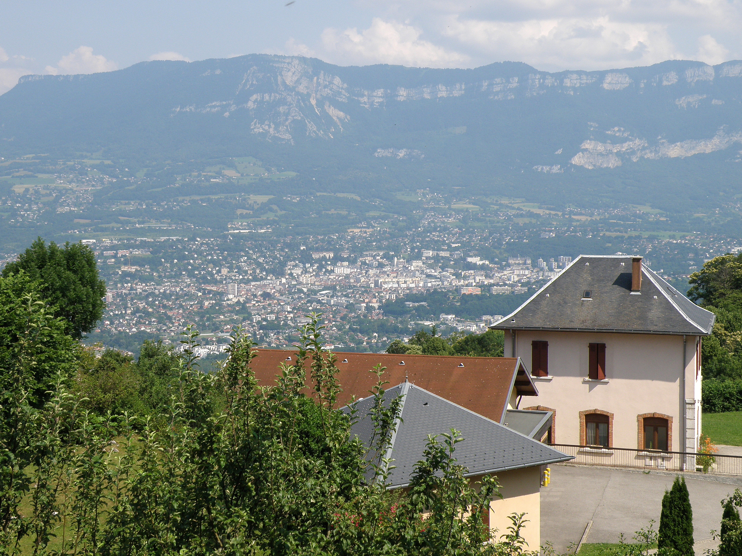 La Chapelle-du-Mont-du-Chat, comm. du département de la Savoie (région Rhône-Alpes, France), sur la rive occidentale du lac du Bourget. À l'avant-plan à droite, la mairie. À l'arrière-plan, l'agglomération d'Aix-les-Bains, sur la rive opposée (orientale) du lac.